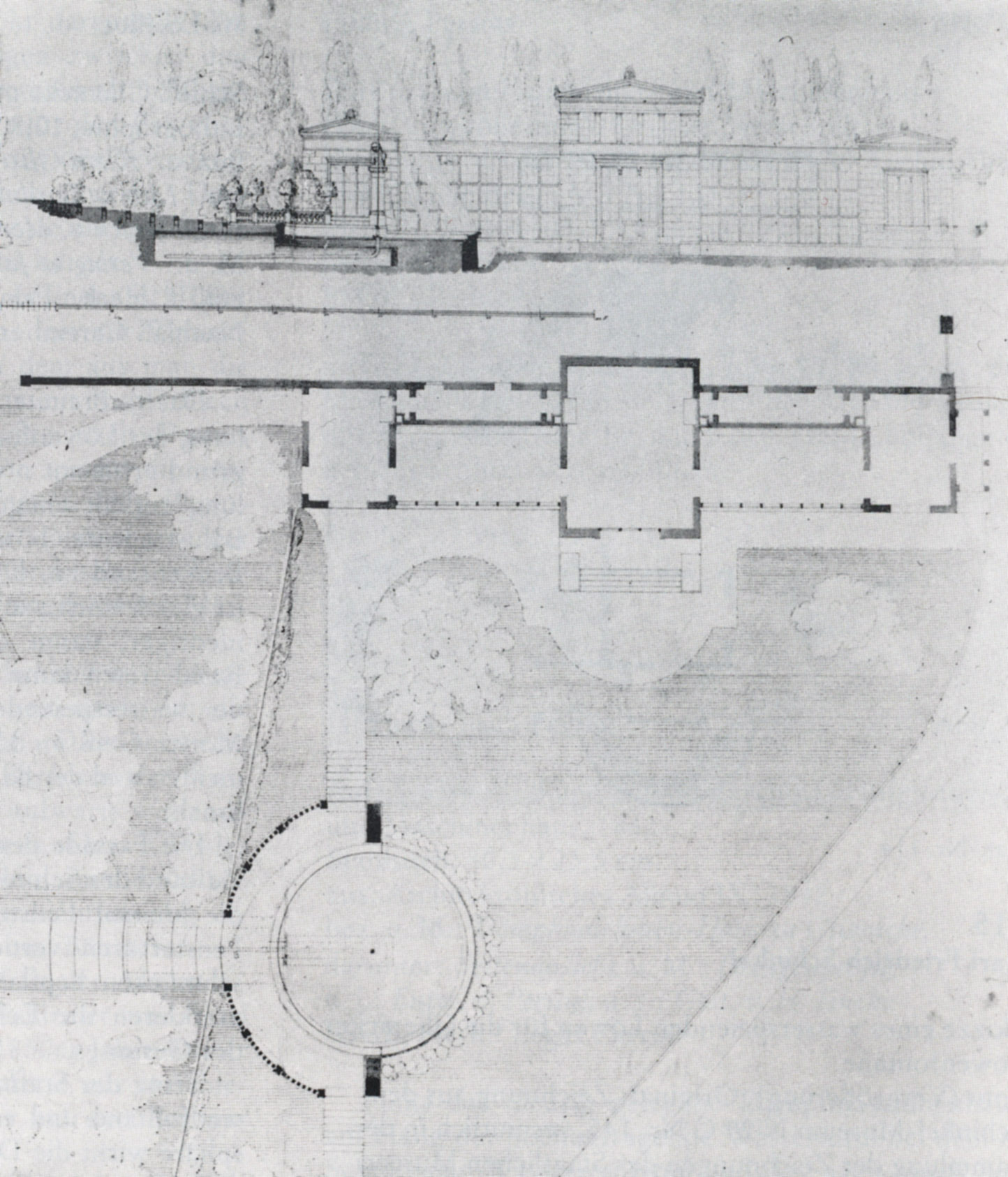 Ludwig Persius nach Schinkel, Entwurf zum Gewächshaus 1837